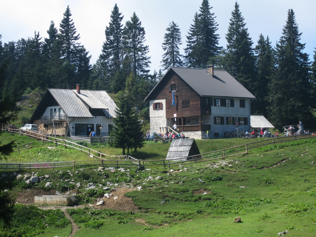 Dom na Menini planini